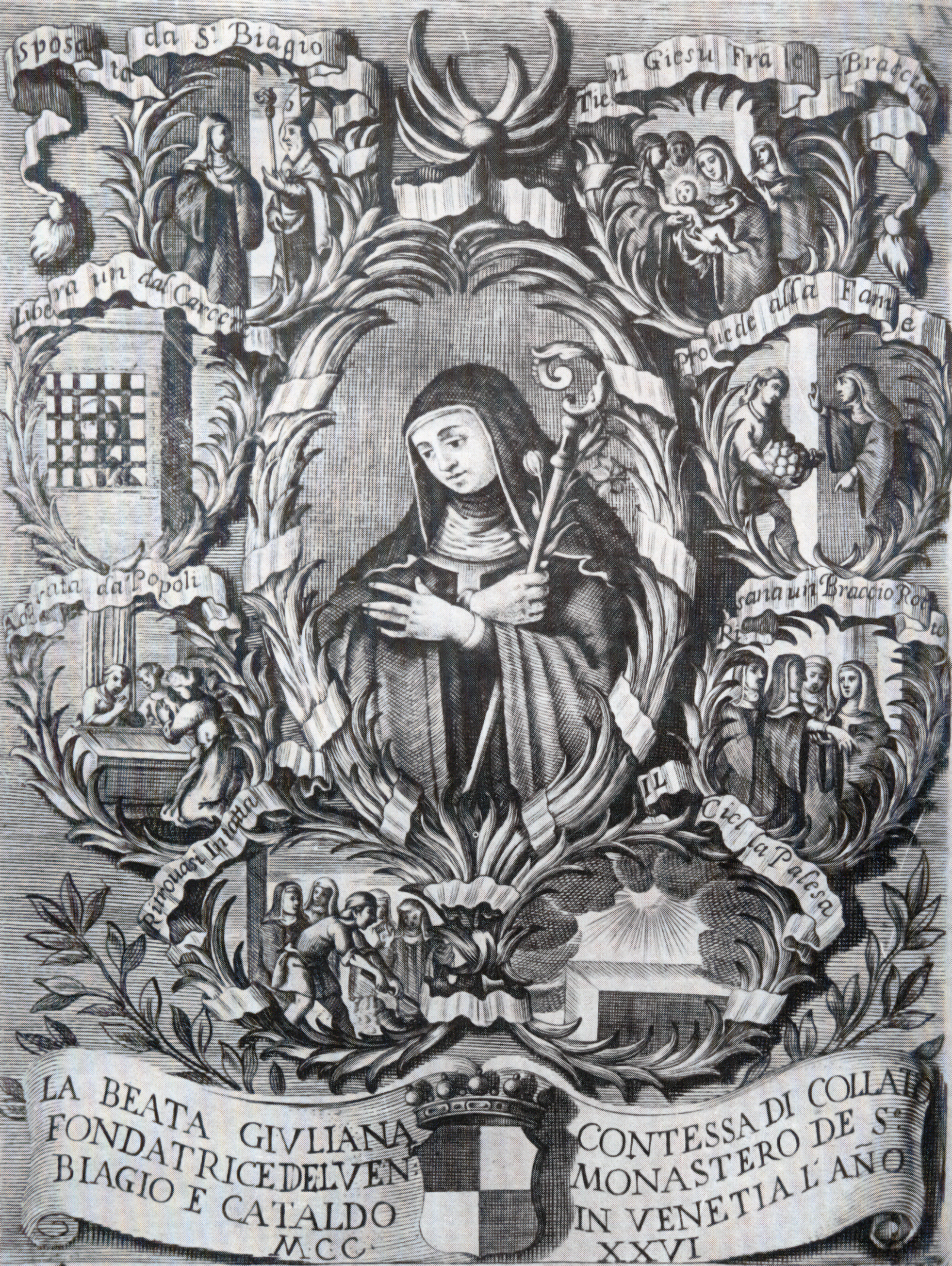 Giuliana nacque a Collalto nel 1186 dal Conte Rambaldo VI e da Giovanna dei Conti di Sant’Angelo di Mantova. Educata alla preghiera, a soli 12 anni vestì l’abito di San Benedetto nel Monastero di Santa Margherita, in quel di Salarola sui Colli Euganei. e a 34 anni conobbe Beatrice d’Este con la quale fondò una nuova comunità religiosa. Giuliana di Collalto si spostò nell’isola chiamata allora Spinalonga (ora Giudecca), dove riedificò, ingrandì e portò all’antico splendore la chiesa abbattuta di San Cataldo. La chiesa divenne luogo di preghiera e penitenza dedicato ai Santi Biagio a Cataldo. Eletta badessa nel nuovo monastero, Giuliana compì molti miracoli prima e dopo la morte avvenuta il primo giorno di settembre del 1262 a 76 anni. Prima di morire, Beata Giuliana patì di forti mal di testa e per questo è ancor oggi invocata dai sofferenti di emicrania. Sepolta nel cimitero della Chiesa dei Santi Biagio e Cataldo, Beata Giuliana di Collalto, come attestano numerosi biografi, continuò a dispensare miracoli anche dopo la sua morte. Intorno al 1290, il corpo della Beata venne ritrovato integro, così come la cassa in legno. Il corpo venne dapprima collocato in una sarcofago ligneo (ora conservato al Museo Correr di Venezia) e successivamente, nel 1733, posto in un altare in marmo della chiesa dedicata ai Santi Biagio e Cataldo. Nei primi anni del Cinquecento la nomea di Giuliana come taumaturga delle emicranie cominciò a diffondersi e raggiunse una considerevole notorietà. Nel 1753 Papa Benedetto XI estese ai feudi della famiglia Collalto il culto della Beata Giuliana fino ad allora limitato alla sola città di Venezia. Portato nel 1810 nella chiesa del Redentore, il corpo di Beata Giuliana fu spostato nel 1822 nella parrocchiale di Santa Eufemia dove tuttora è venerato all’interno della cappella dedicata a Sant’Anna.